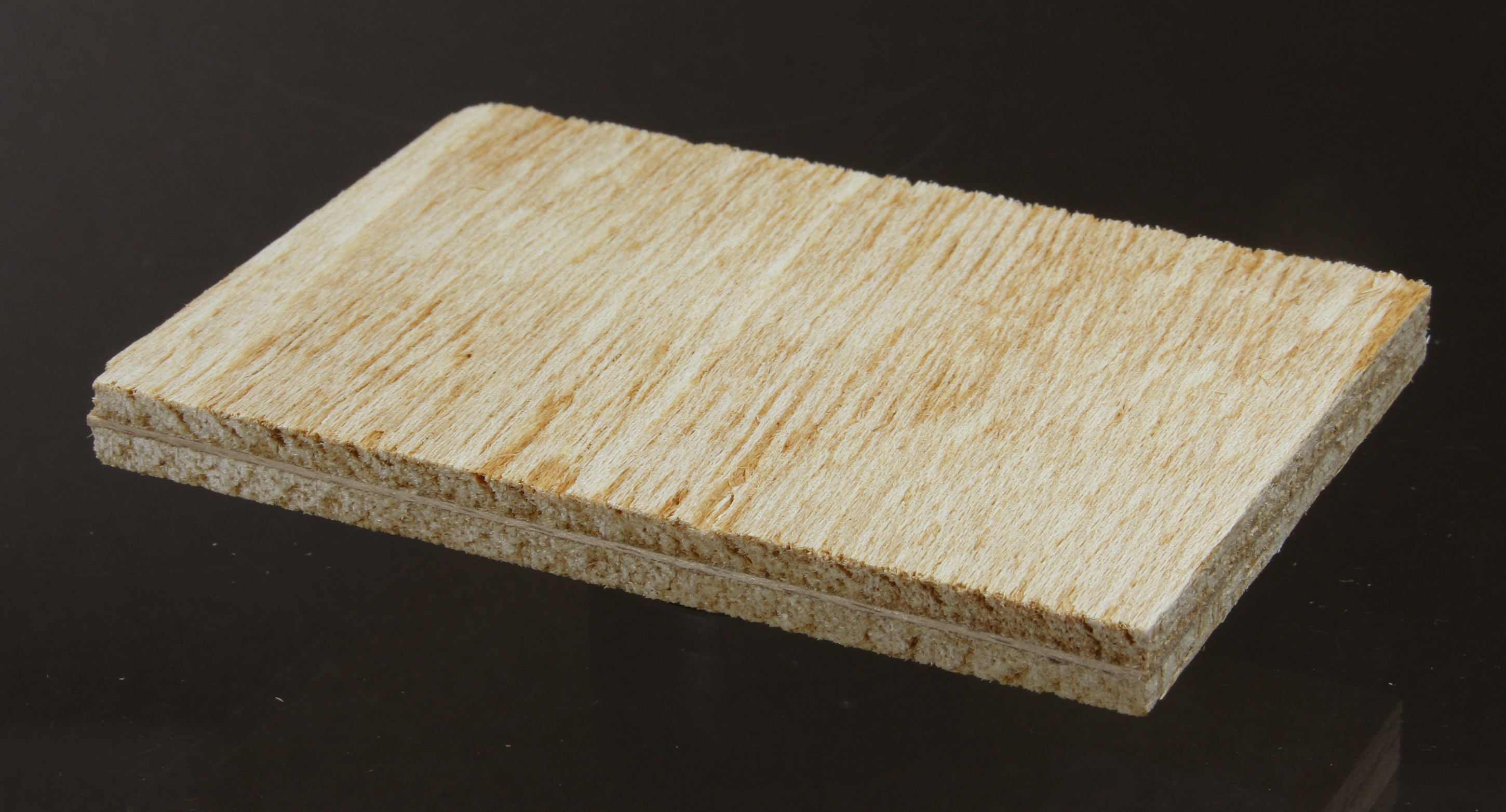 Biegesperrholz